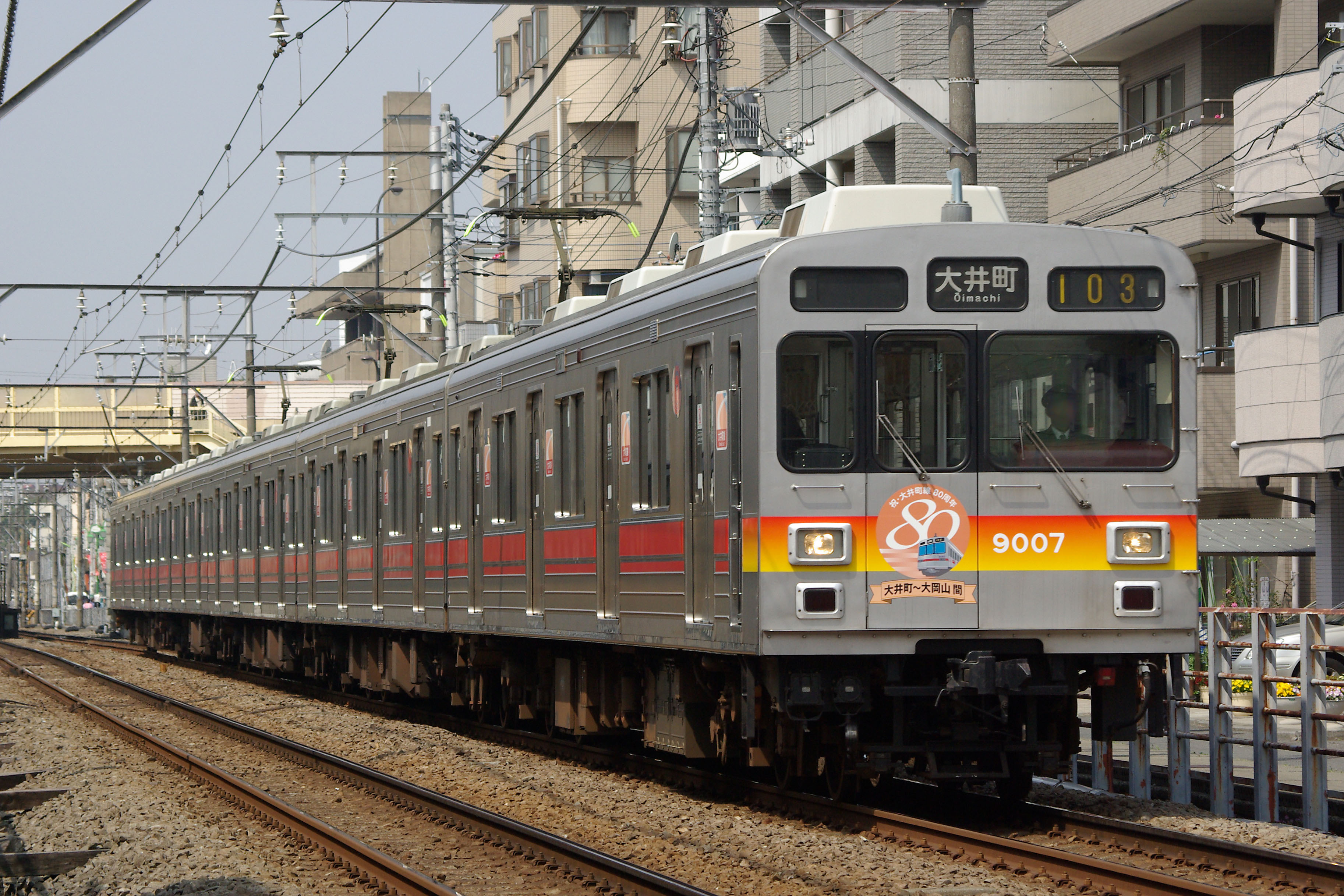 東急9000系電車 9007F グラデーション帯化された後の写真 東急大井町線 尾山台駅-等々力駅